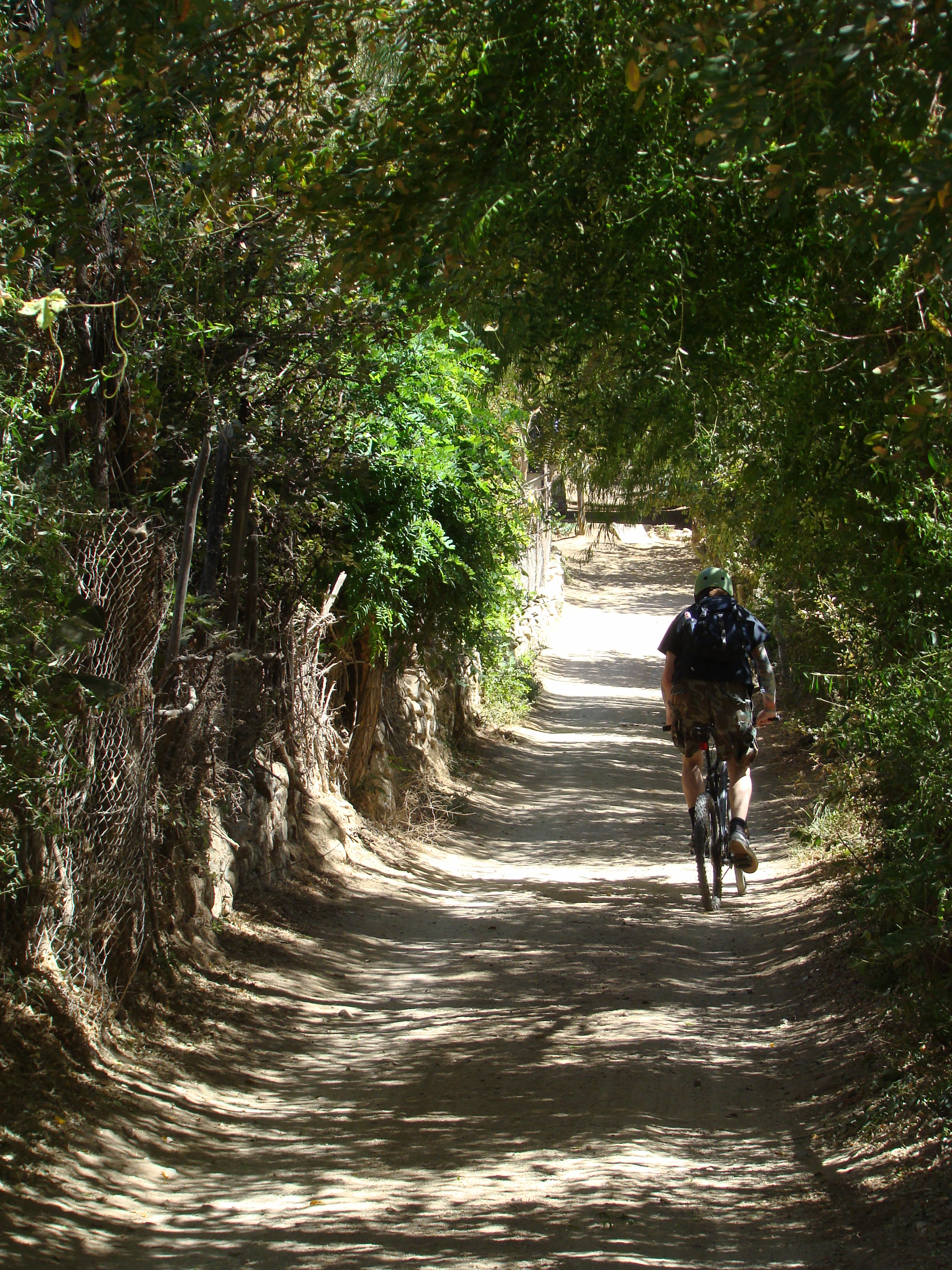 en Horcón bajo camino a Pisco Elqui